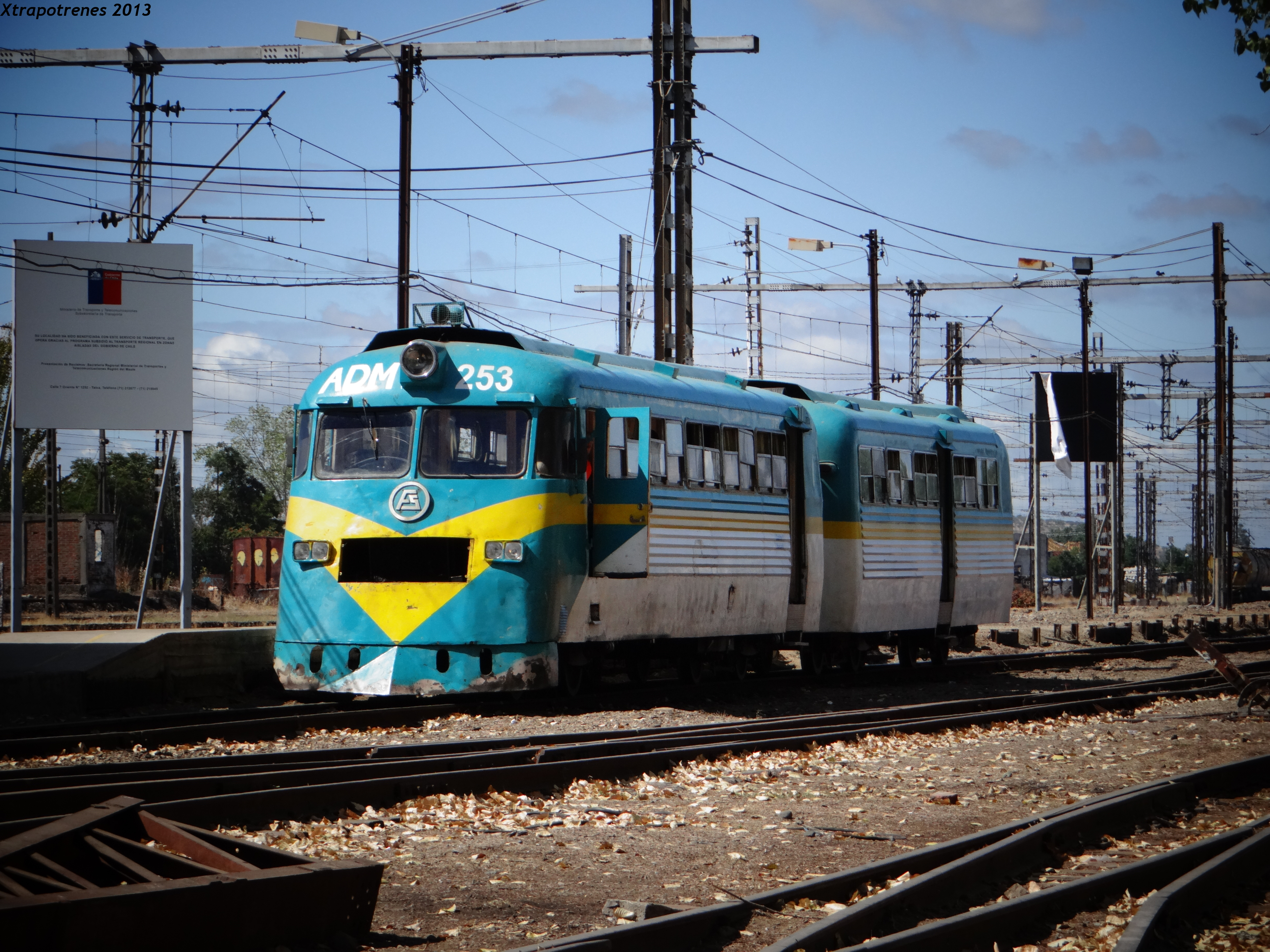 12.02.13 11:17 Hrs.. El día anterior este buscarril salio desde Talca con el servicio de la tarde para llegar a Constitución a las 20.30 hrs aproximadamente para al otro día salir con el primer servicio a Talca. La cosa es que yo lo espere para poder grabarlo, lugar por donde pasaba a las 20 horas; eran las 21 hrs y no pasaba, ya era evidente el retraso pero decidí esperar media hora mas y nada. En la estación se comentaba que el tren había quedado parado en "Pichaman" y que tendría un retraso de un "par de horas".. Eran las 3:20 AM y recién paso por Maquegua, por lo que aproximadamente llego a Constitución a las 4:00 AM y mas tarde debía salir a las 7:00 AM desde Constitución, con la tripulación totalmente agotada (Maquinista, conductor y un mecánico). La falla fue producto de que la correa del motor se corto. La gente de la zona dice que es de lo mas normal que sucedan este tipo de cosas y termine pasando 3 o 4 AM, pero lo que es mas destacable es la fuerza y dedicación que tiene la tripulación para mover este tren a pesar de todas las dificultades En video: El ultimo ramal || Buscarril Talca.